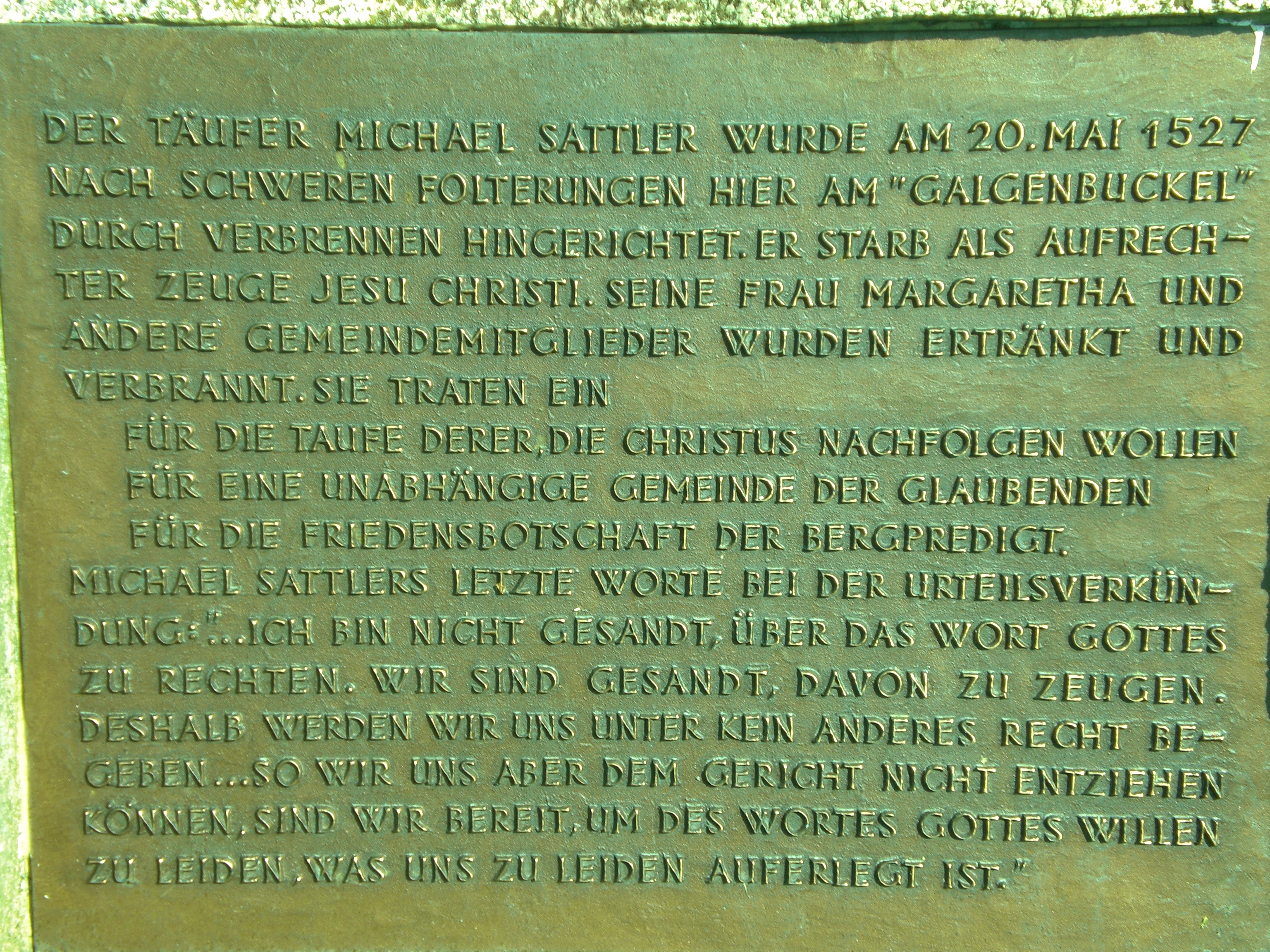 Tafel auf der Rückseite des Gedenksteins für Michael und Margaretha Sattler in Rottenburg am Neckar